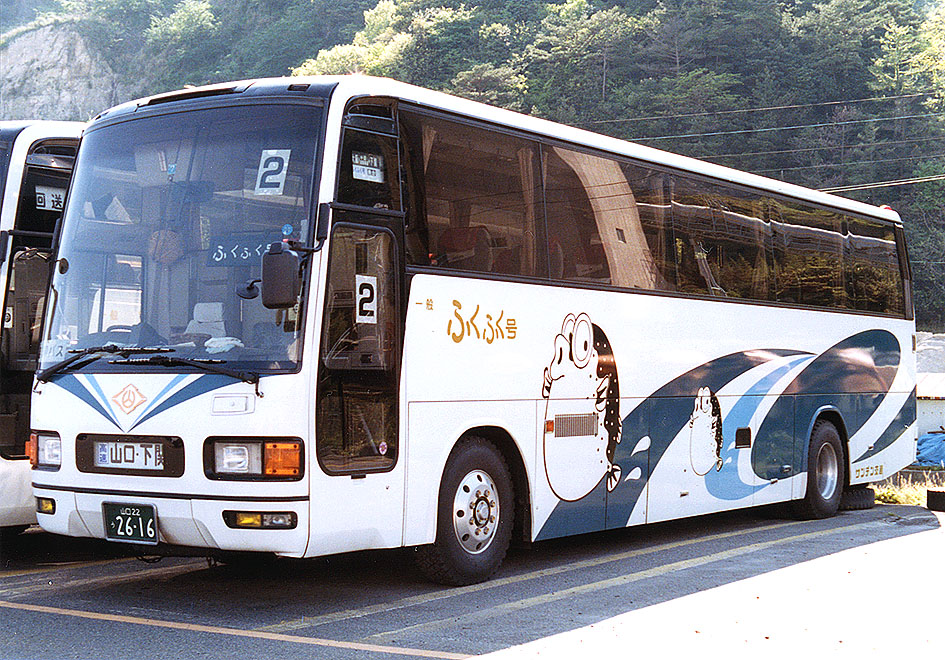 サンデン交通 ふくふく号（大阪） 三菱ふそう エアロクィーンM P-MS729S